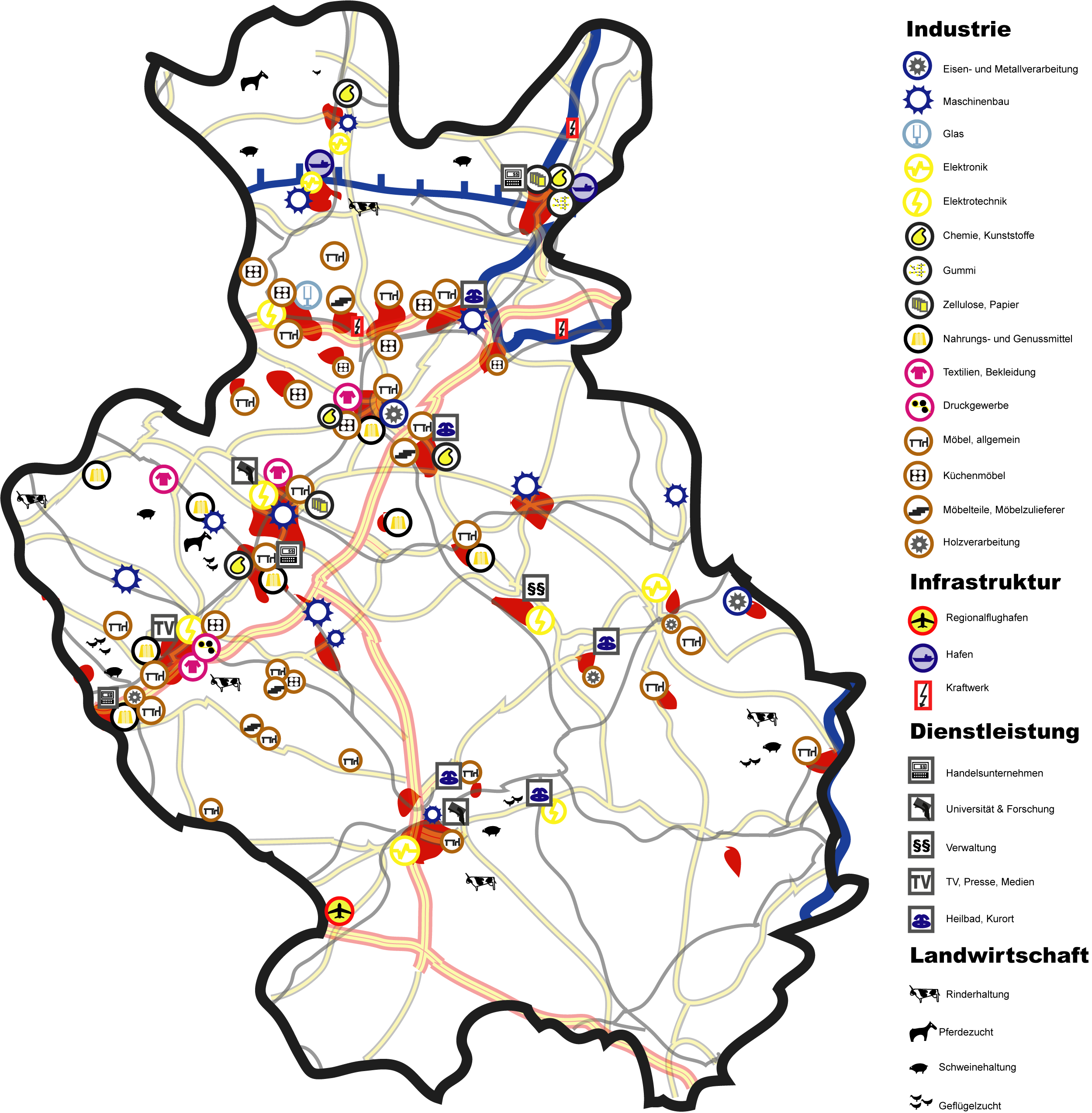 map of ecnomy in Ostwestfalen-Lippe.